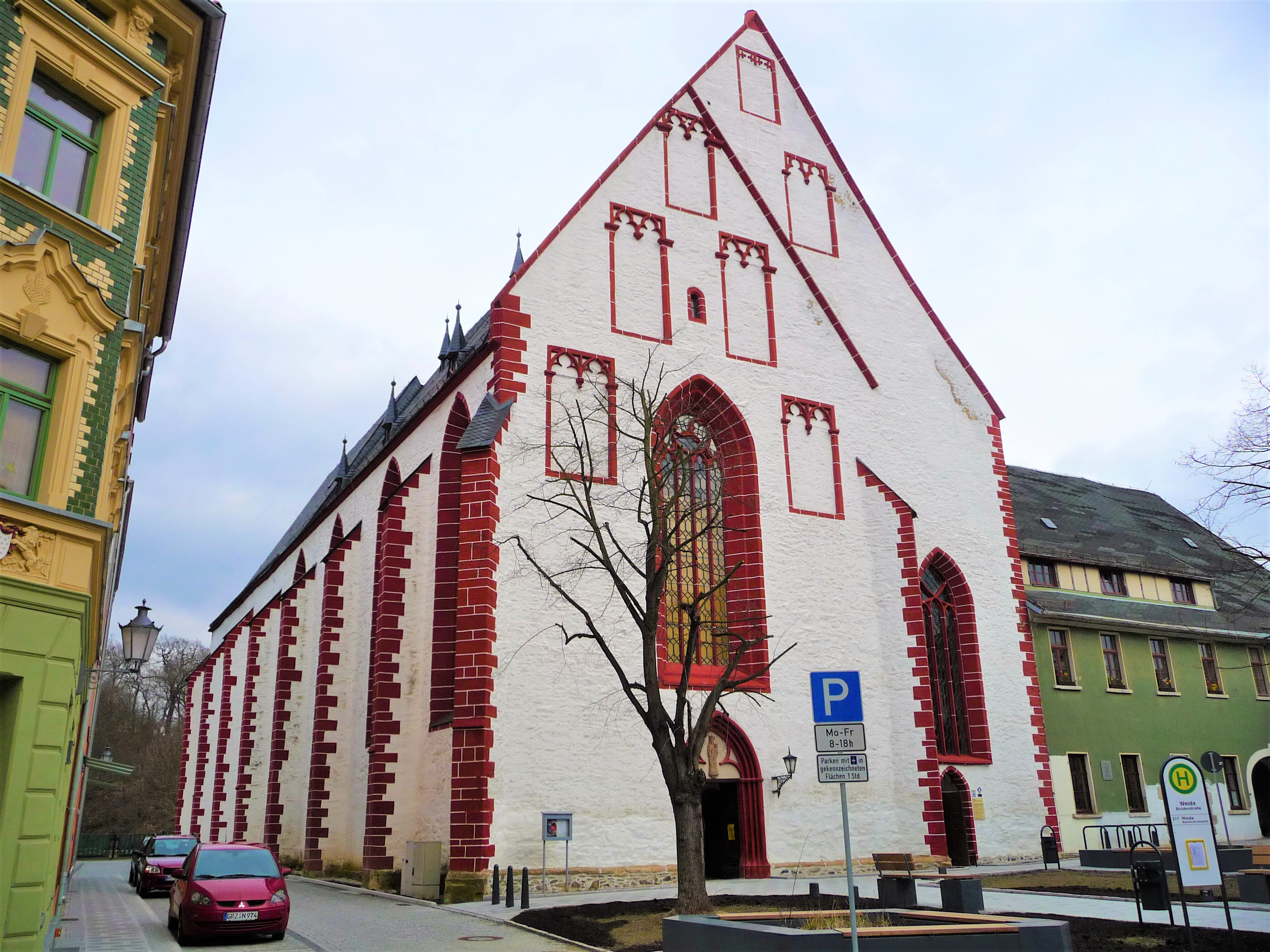 Stadtkirche St. Marien in Weida, Thüringen